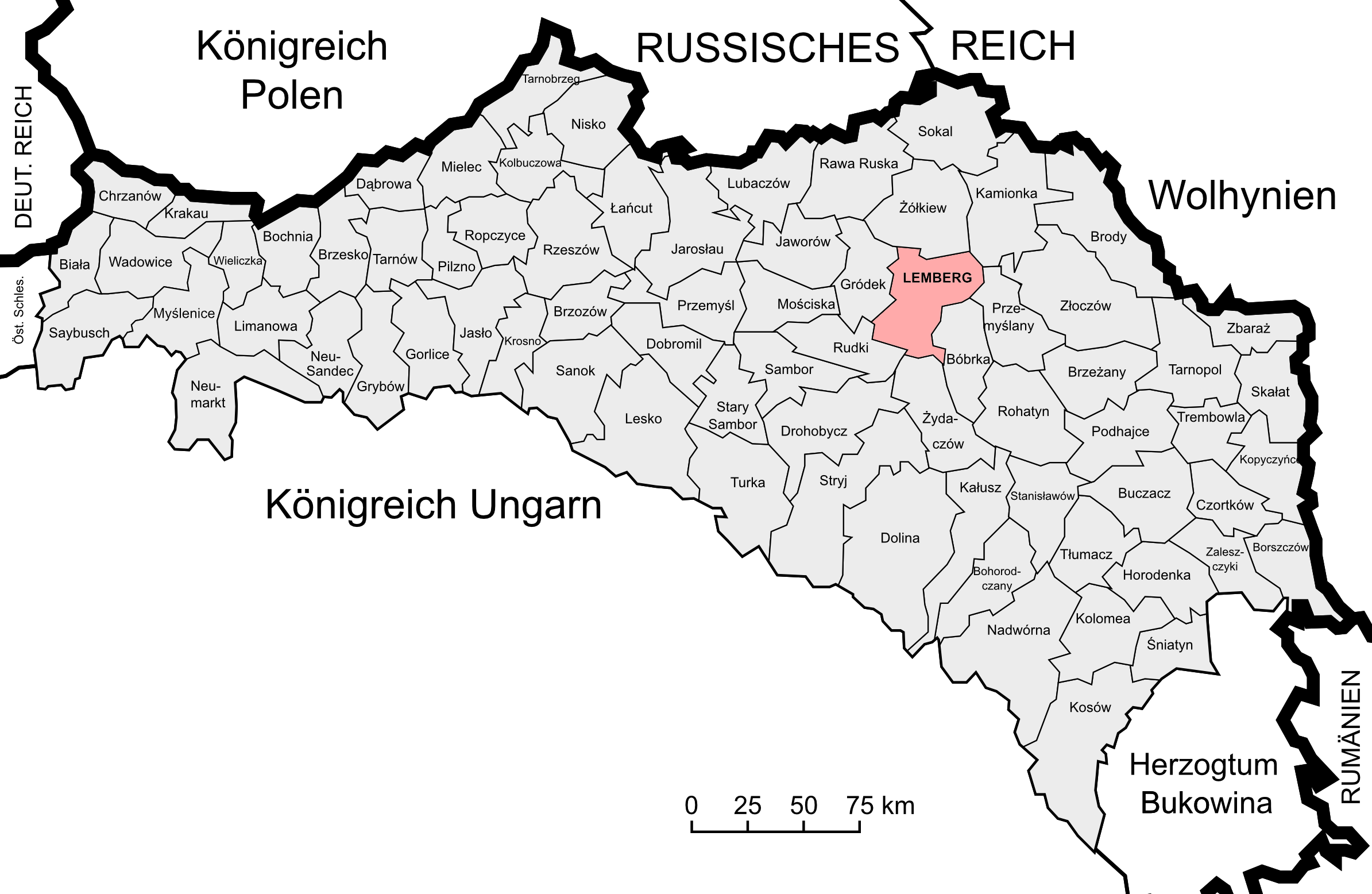 Округ Лемберг